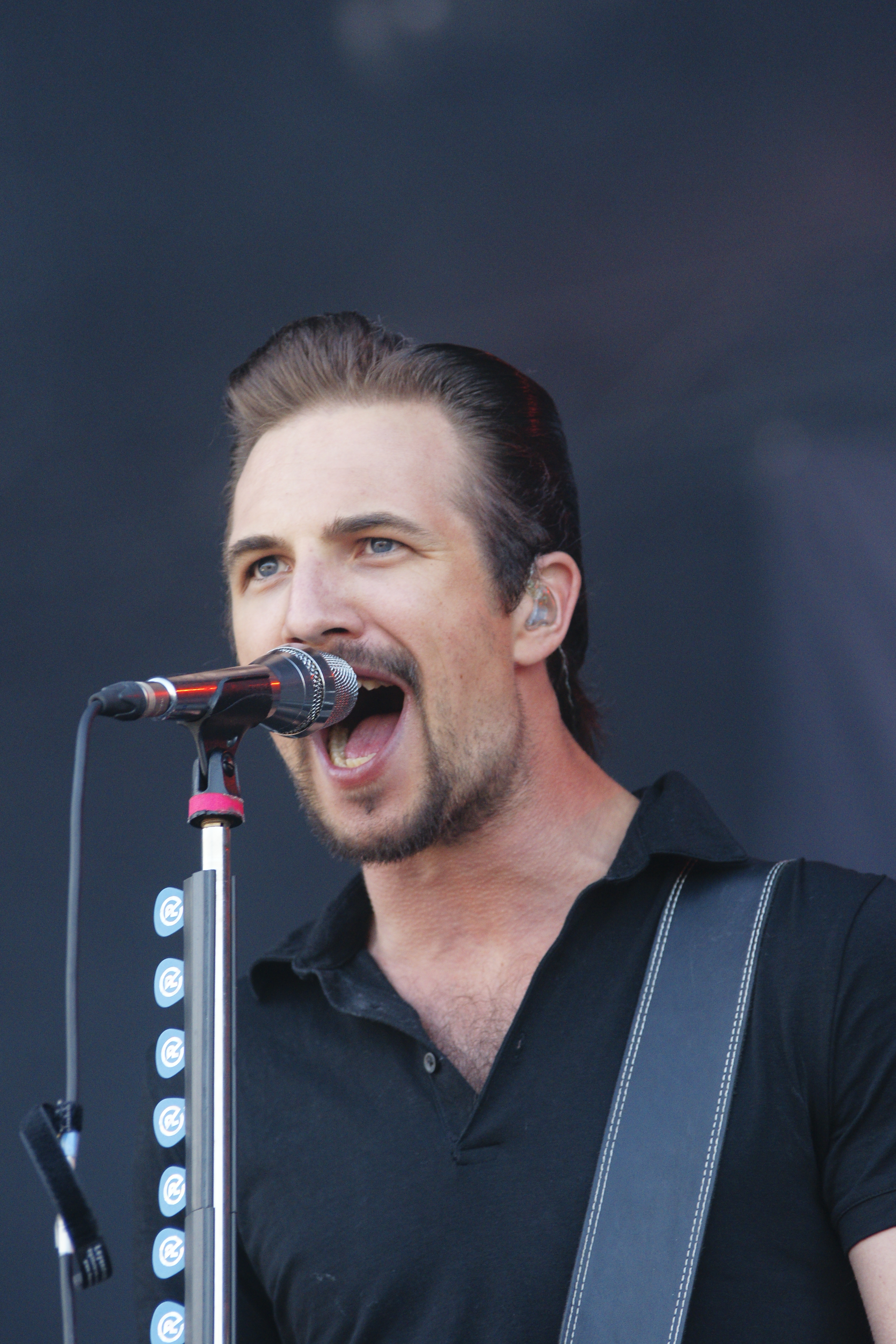 Deichbrand Festival 2013